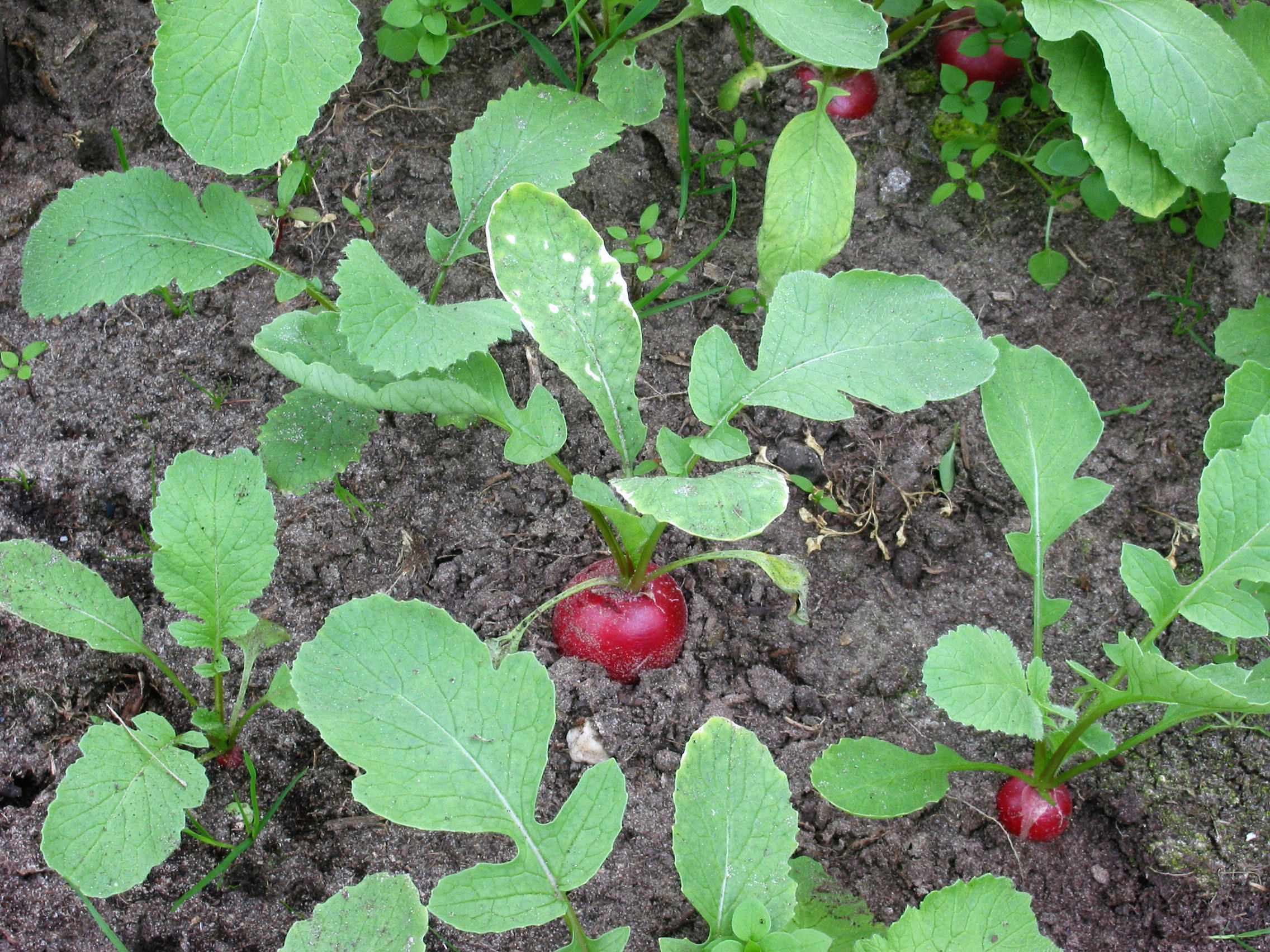 (nl: Radijs planten) Raphanus sativus subsp. sativus